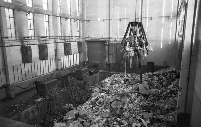 VW-Werk, Wolfsburg Müllverbrennung